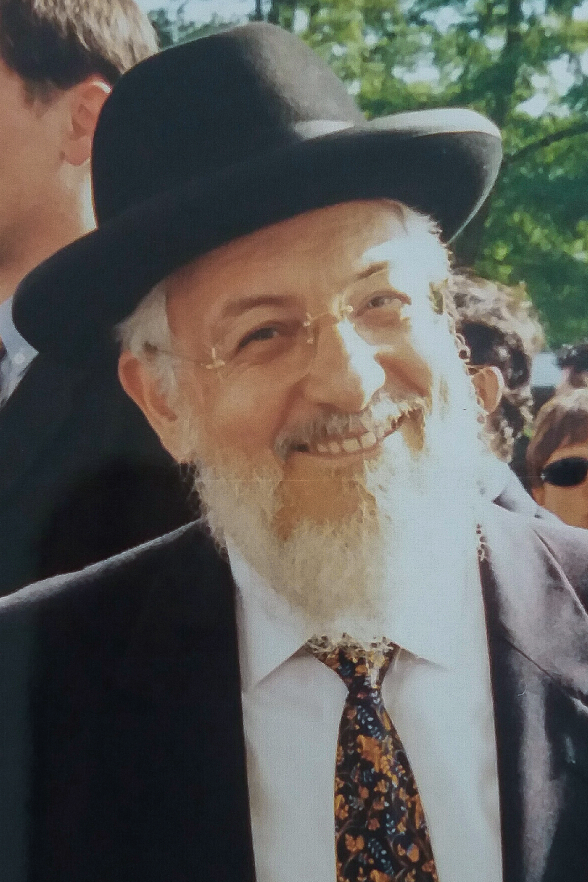 Le Grand Rabbin de France Joseph Haïm Sitruk en 1999